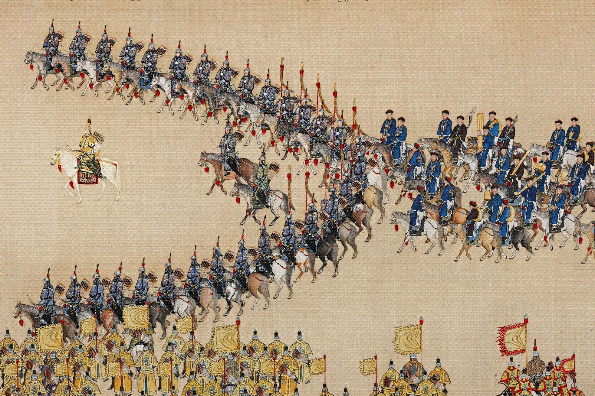 乾隆帝大阅兵局部